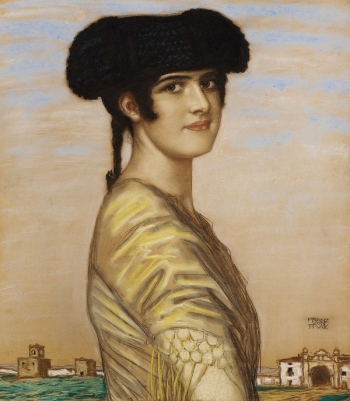 Tochter Mary als Spanierin